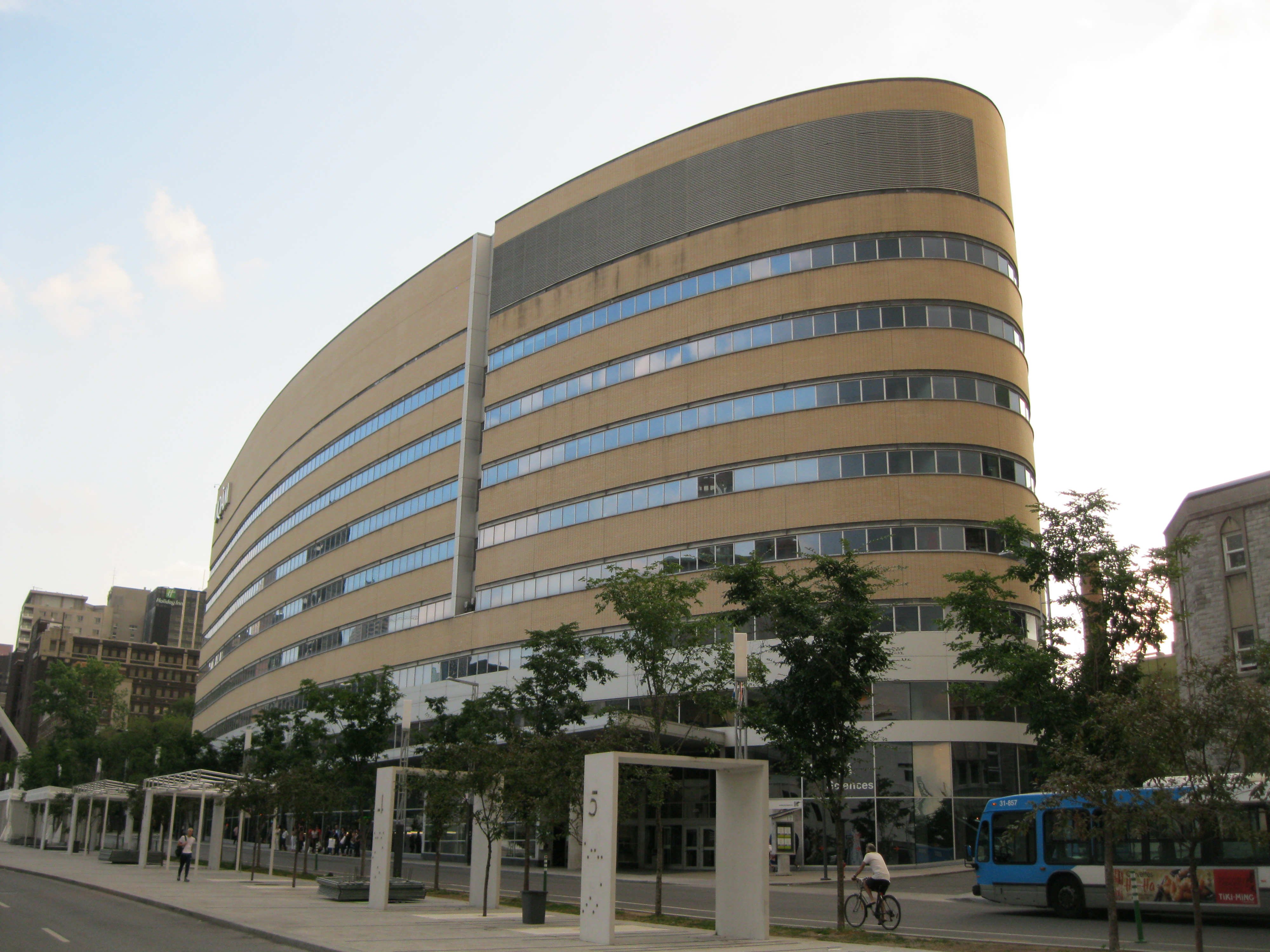 Pavillon Président-Kennedy, Complexe des sciences Pierre-Dansereau, Université du Québec à Montréal